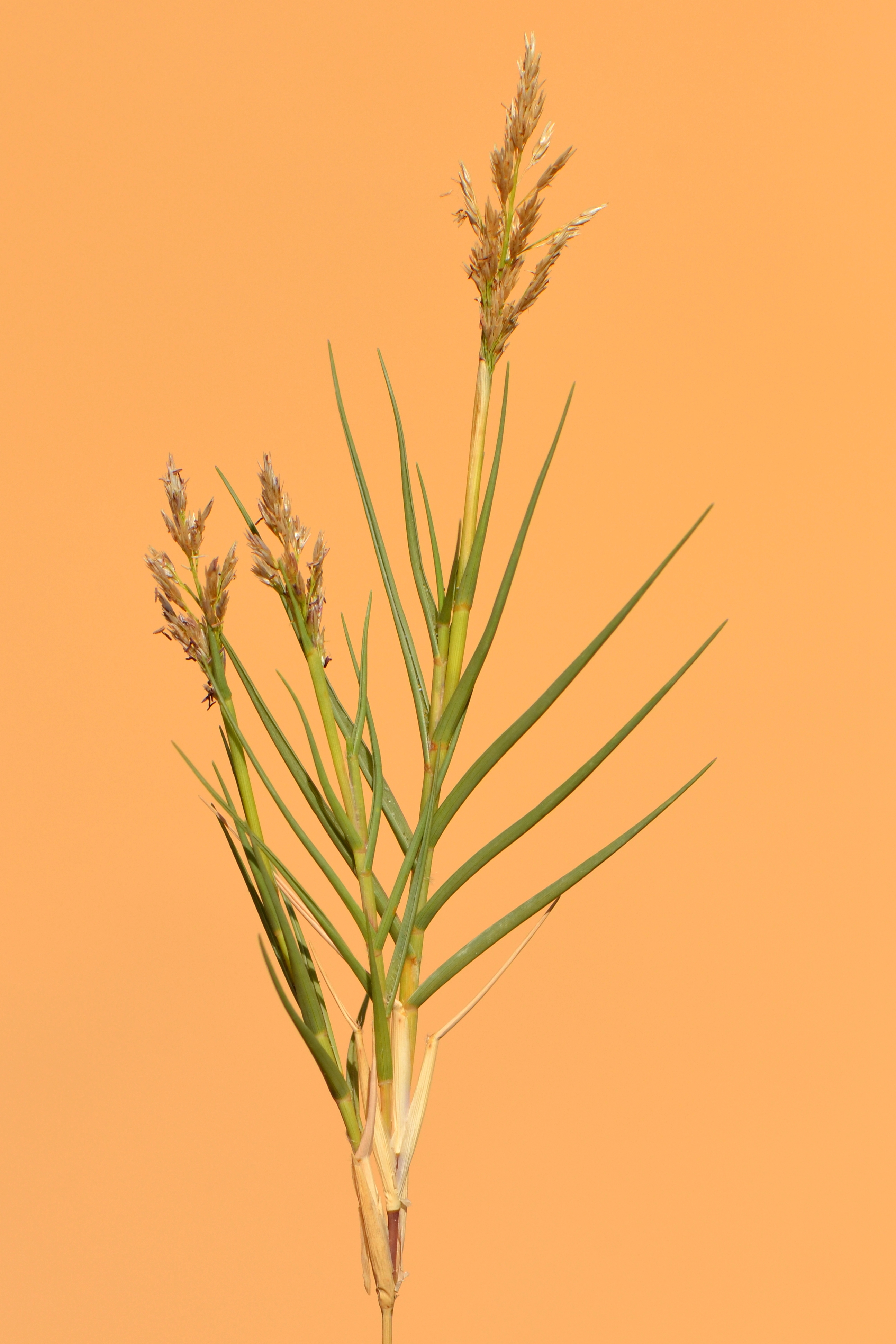 Aeluropus littoralis Poacées